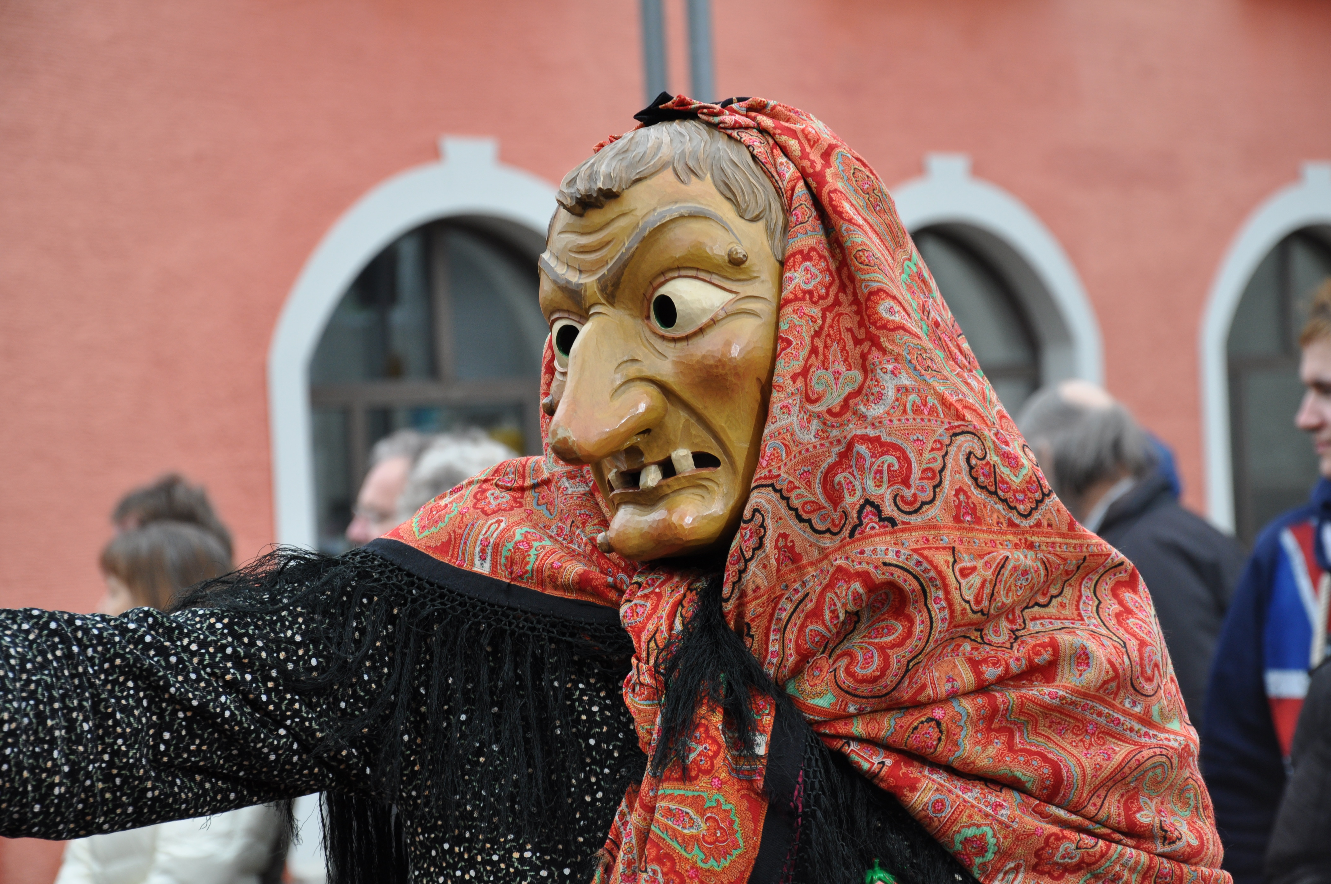 Narrenzunft Gengenbach; Narrenfigur: Hexe Fotografiert beim Landschaftstreffen der Vereinigung Schwäbisch-Alemannischer Narrenzünfte (VSAN) 2014 in Tettnang; Narrensprung am Sonntag, 16. Februar 2014